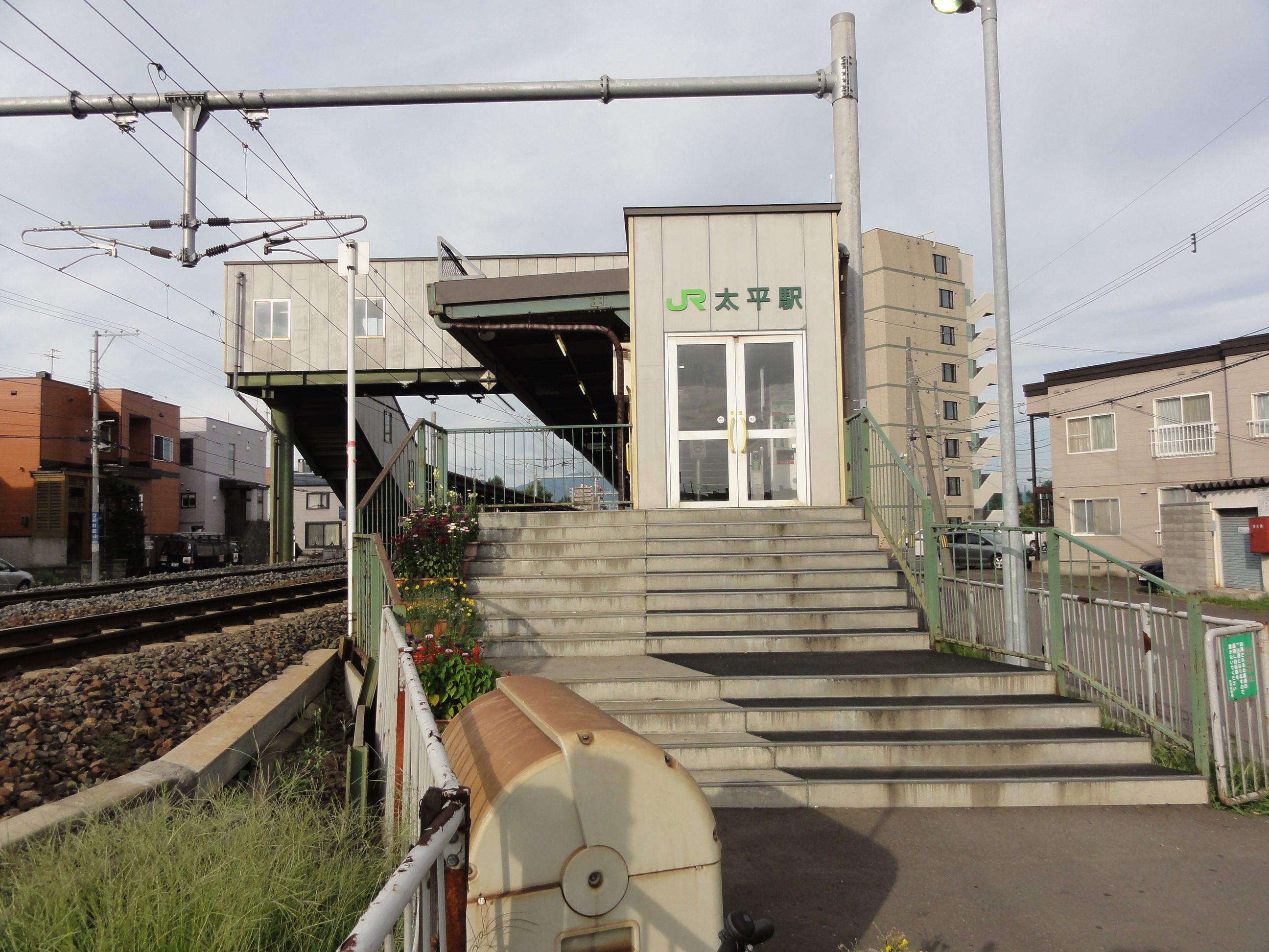 太平駅